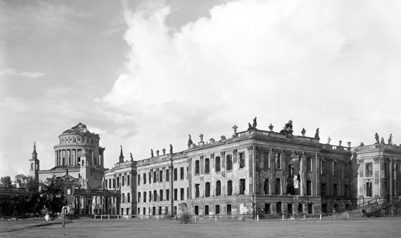 Potsdam.- Ruinen